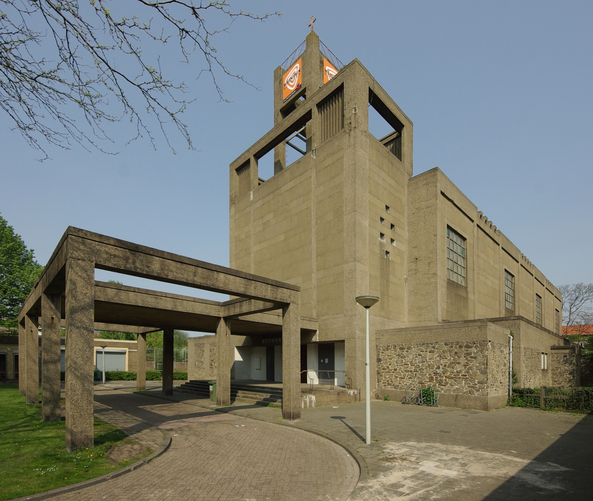 De Sint-Josephkerk aan de Erik de Roodestraat in Amsterdam Bos en Lommer is gebouwd in 1950 tot 1952 door de architecten G.H.M. Holt en K.P. Tholens. Het gebouw werd als kerk gebruikt tot 1990. Thans is het in gebruik als klimhal. Na voordracht in 2007 via de lijst van rijksmonumenten uit de periode 1940-1958, opgesteld door Ronald Plasterk, werd de Sint-Josephkerk erkend als rijksmonument. 82″ N, 4° 50′ 41.28″ E